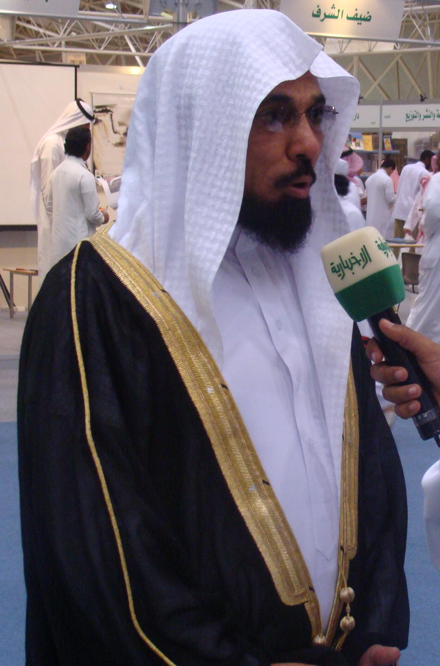 Salman Al-Audah